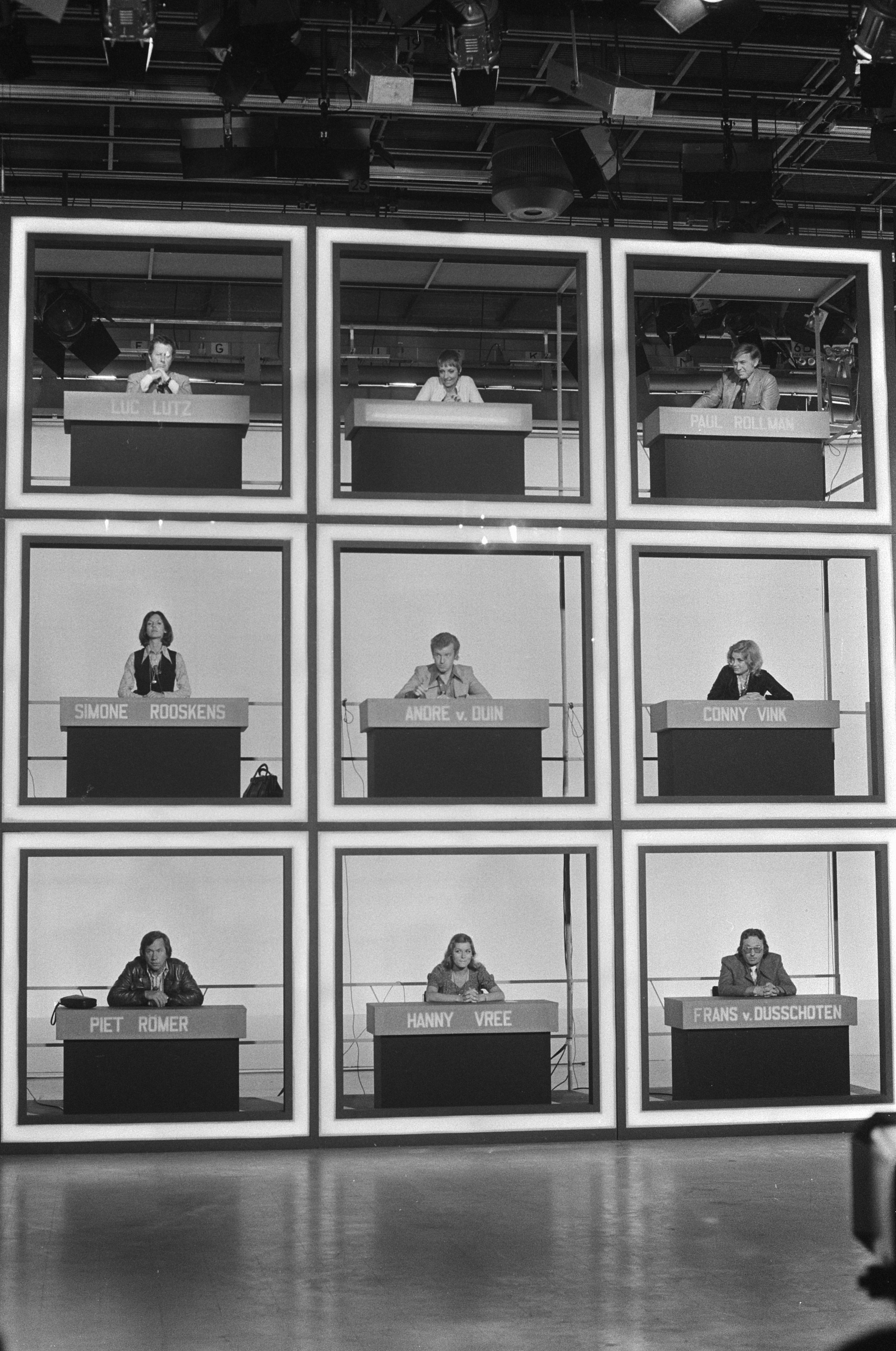 Collectie / Archief : Fotocollectie Anefo Reportage / Serie : [ onbekend ] Beschrijving : Boter, Kaas en Eieren, TROS-quiz (uitzending 26 juli); het panel bestaat uit negen artiesten: middelste rij v.l.n.r. Simone Rooskens, André van Duin en Conny Vink Datum : 24 juli 1974 Trefwoorden : artiesten, televisie, televisieprogramma's Persoonsnaam : Duin, André van, Rooskens, Simone, Vink, Conny Instellingsnaam : TROS Fotograaf : Punt, […] / Anefo Auteursrechthebbende : Nationaal Archief Materiaalsoort : Negatief (zwart/wit) Nummer archiefinventaris : bekijk toegang 2.24.01.05 Bestanddeelnummer : 927-3468